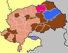 Carte des candidats arrivés en tête par commune dans le canton de Thiéblemont-Farémont aux élections cantonales de 2011.